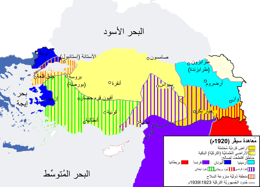 خارطة تُظهرُ تقسيم الأناضول العُثماني بين الدُول الظافرة وفق مُعاهدة سيڤر (1920م) بعد الحرب العالميَّة الأولى.